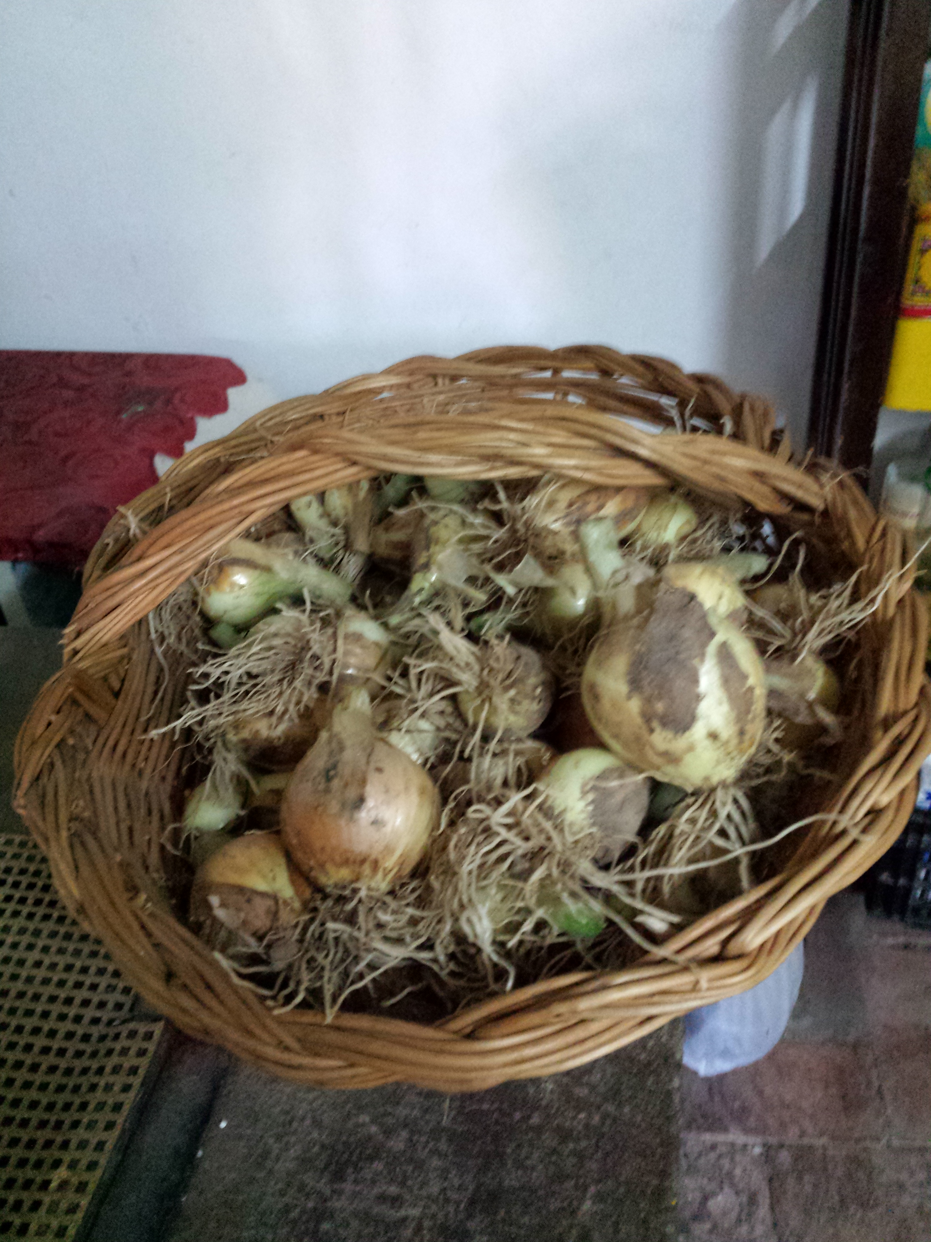 Cistell de cebes de la varietat "Valenciana Babosa", sense les fulles però encara amb les rels. Castelltallat, Bages